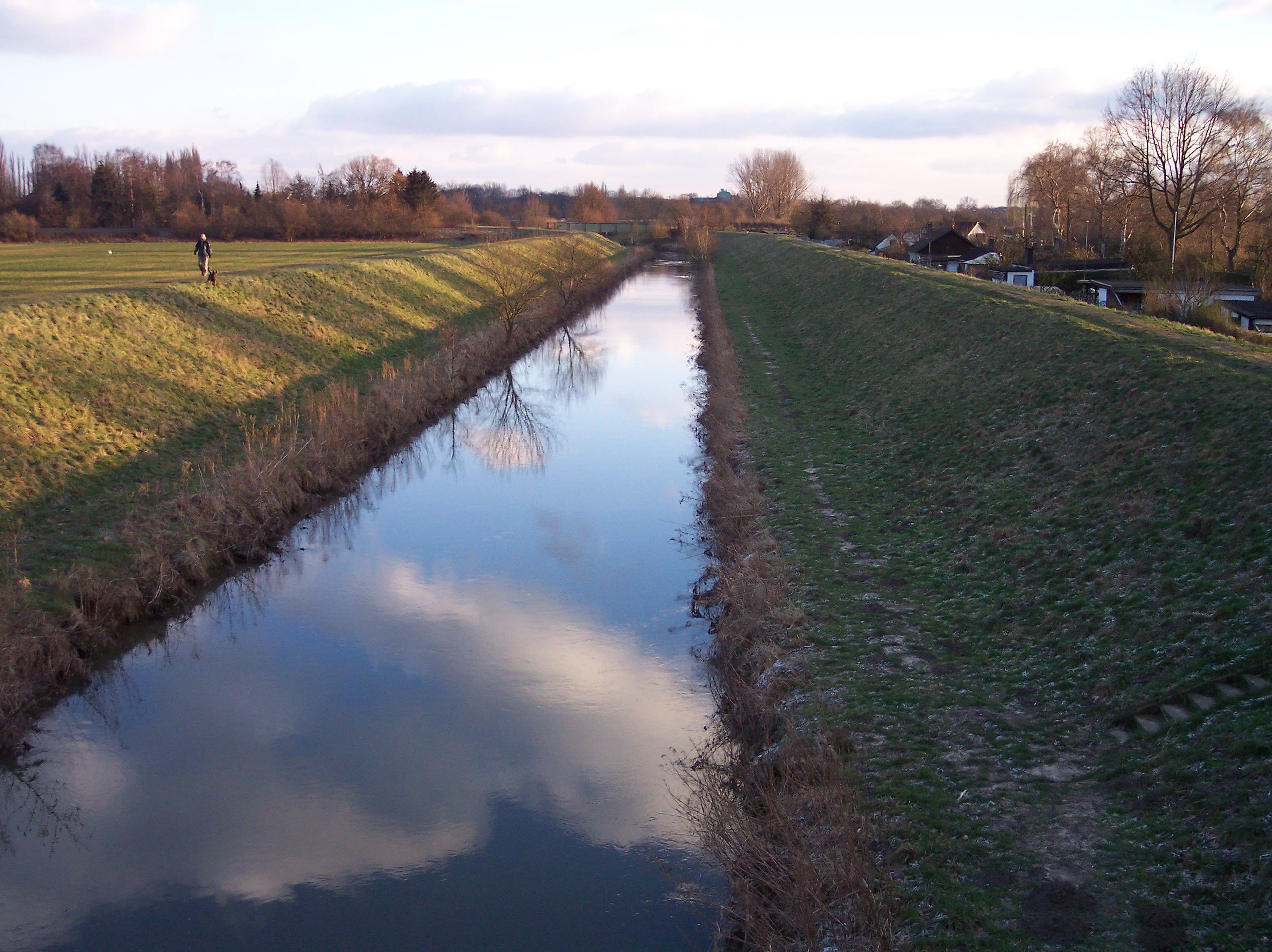 Die Ahse bei Hamm in Westfalen. Ein 39,1 km langer, linksseitiger (südlicher) Nebenfluss der Lippe in Nordrhein-Westfalen